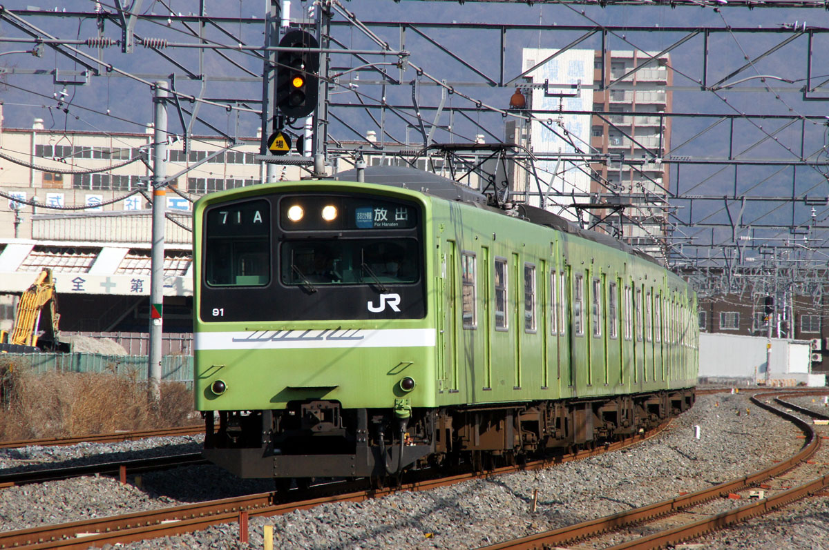 JR西日本201系（おおさか東線）